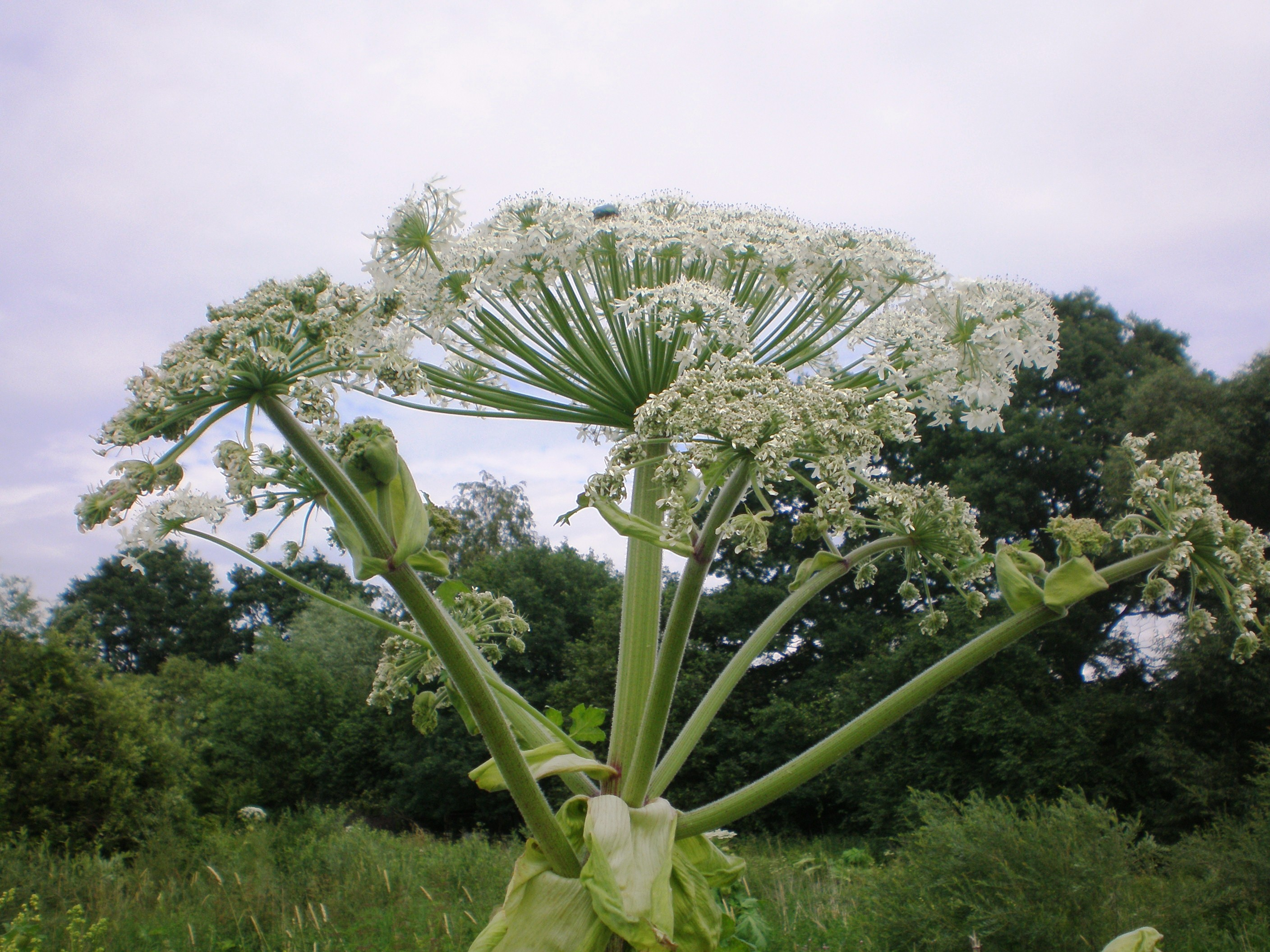 Heracleum sosnowskyi